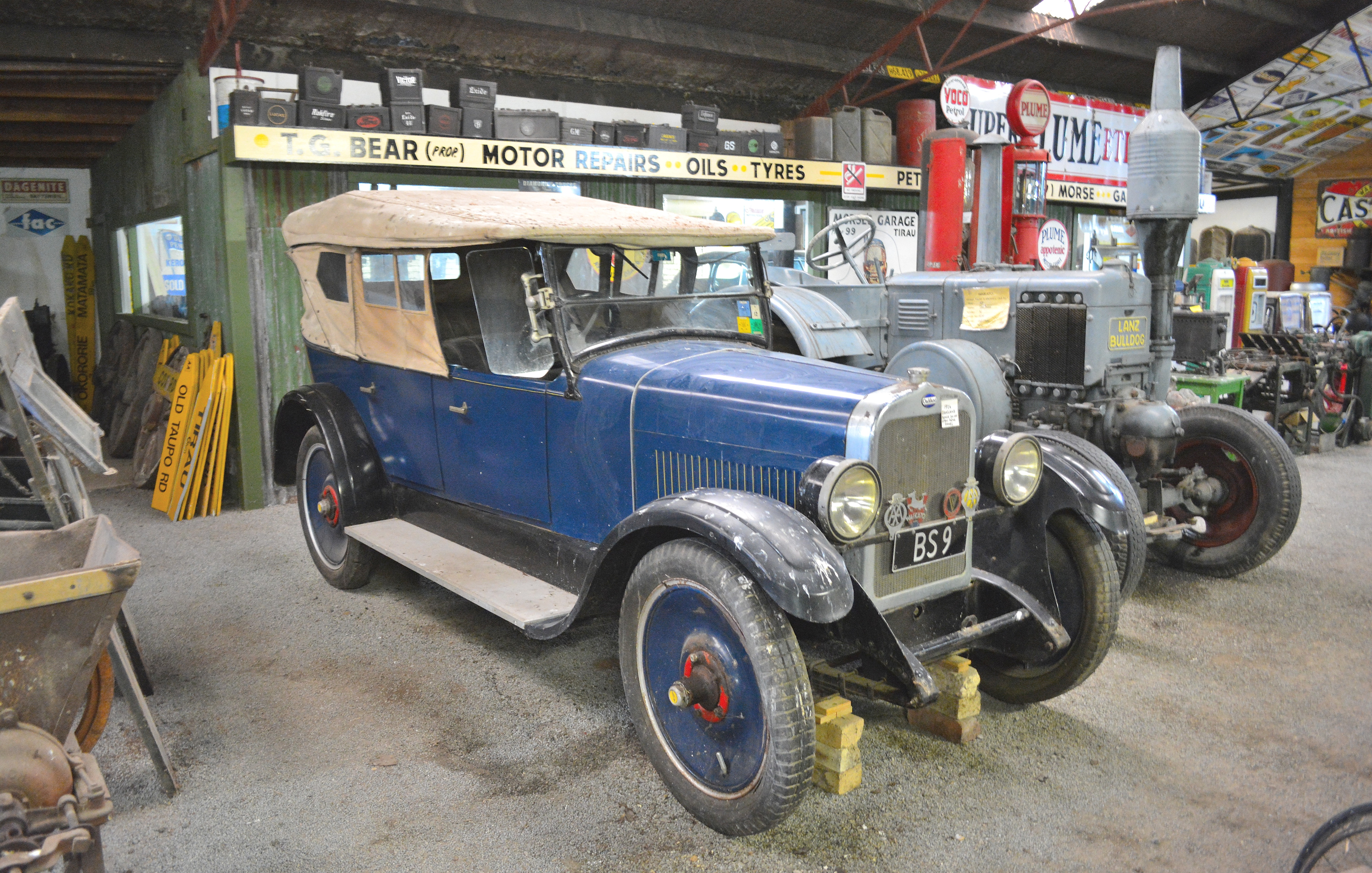 Tirau,New Zealand